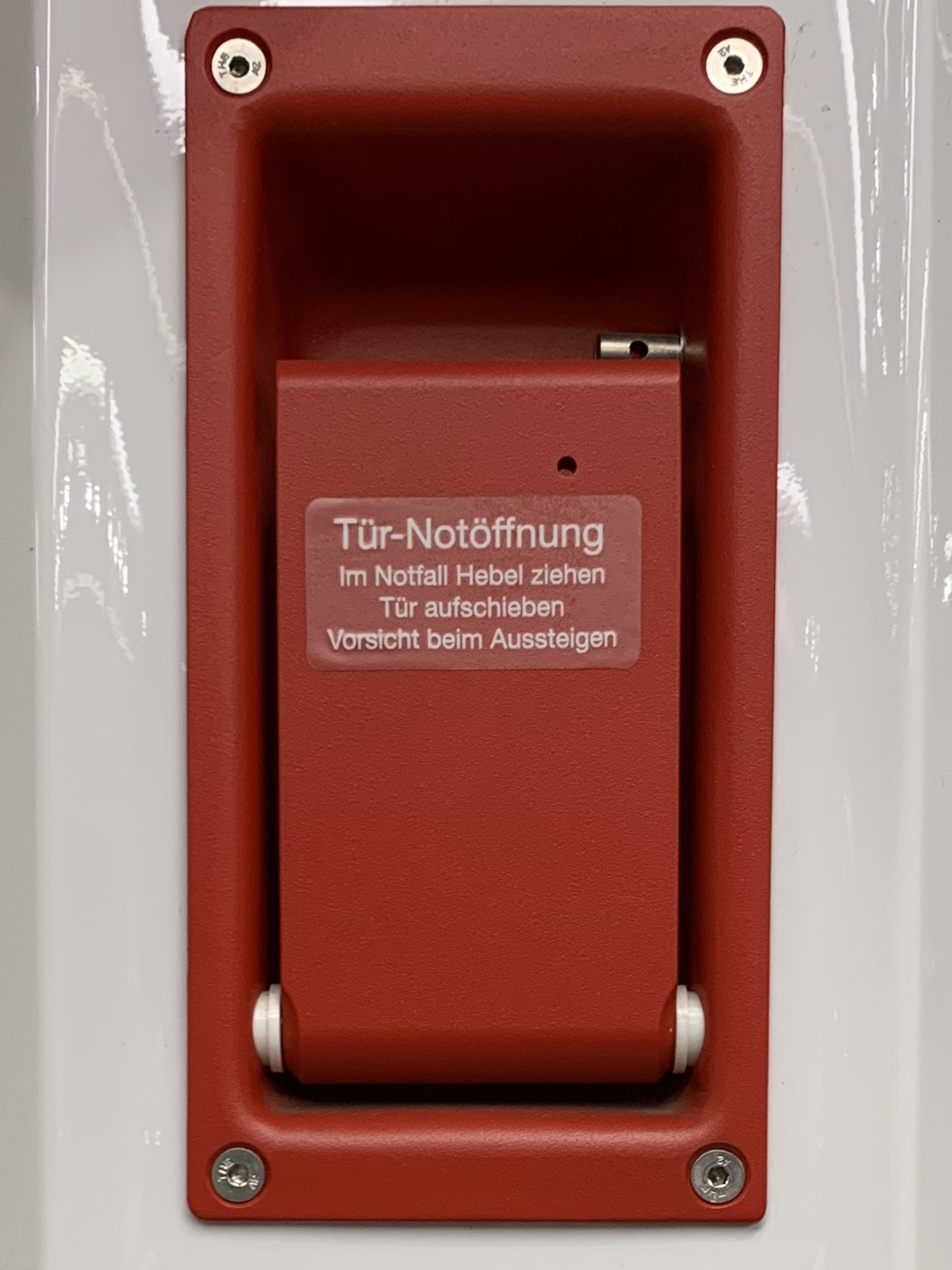 Hebel zur Notentriegelung im Fahrgastraum eines Triebwagens der Baureihe TW 3000 der üstra Hannoversche Verkehrsbetriebe.